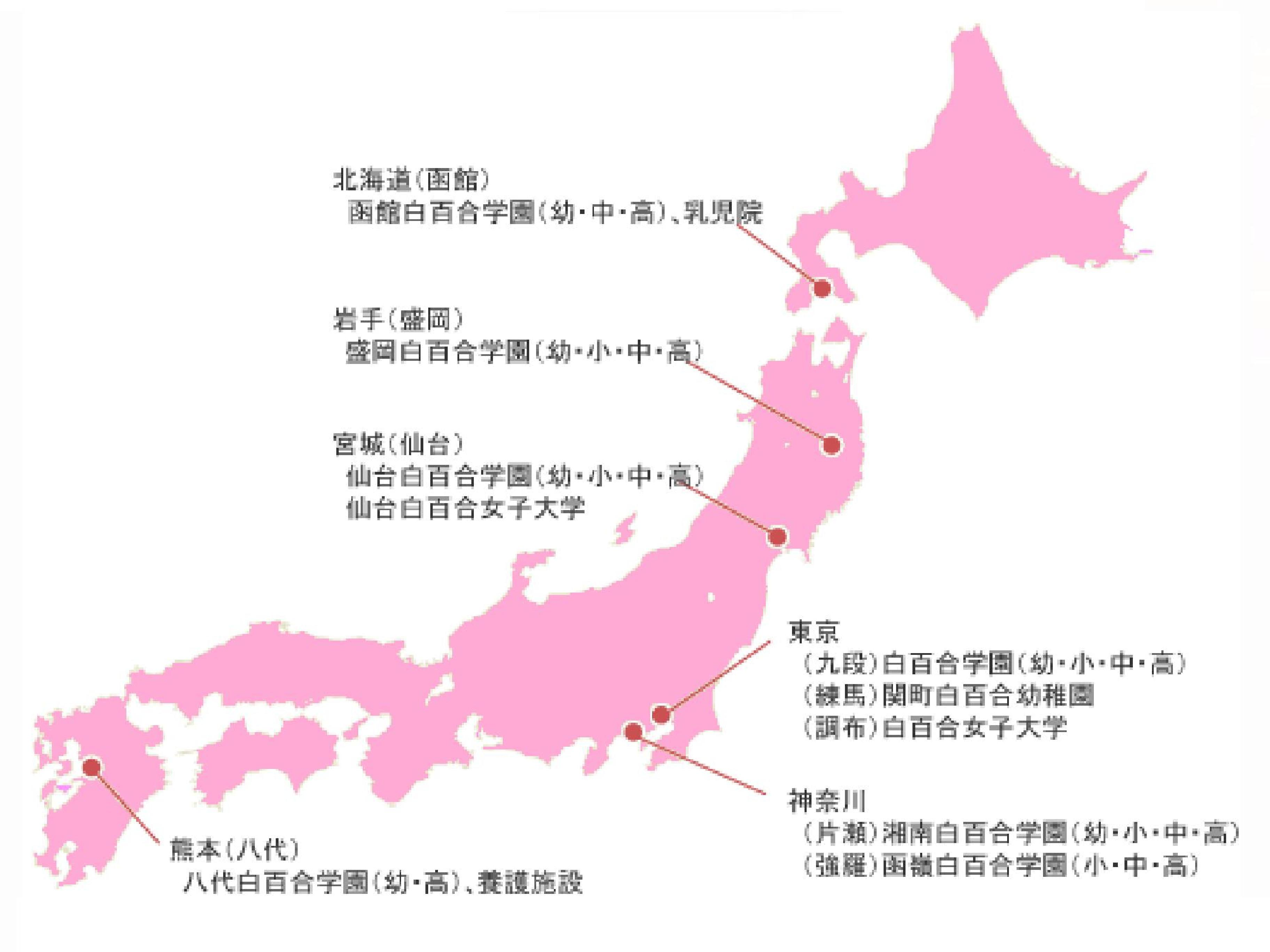 白百合女子大HPより